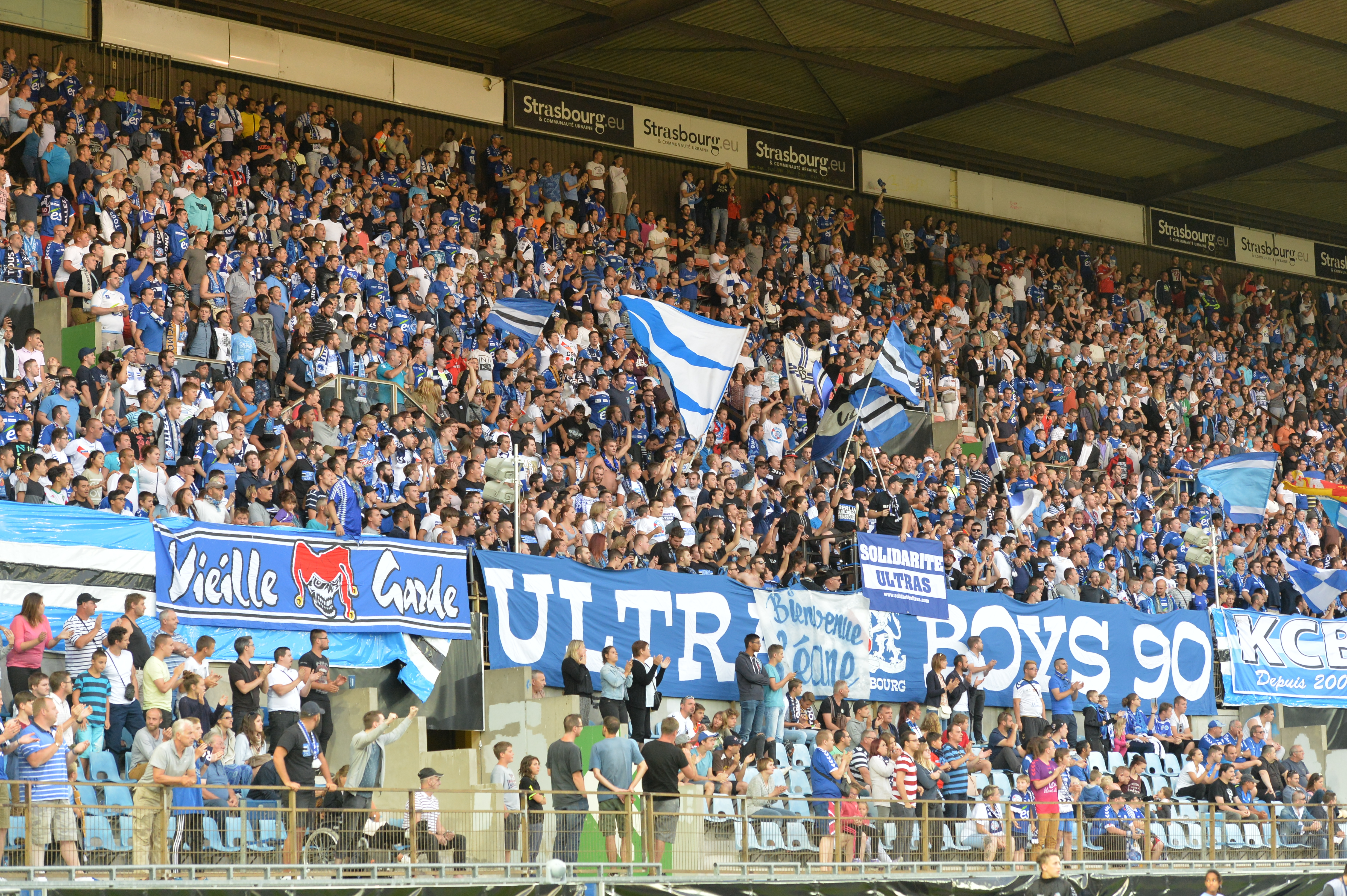 tifo et kop RCSA Racing Club de Strasbourg Alsace au stade de la Meinau. photo Franck KOBI / Haguenau port 06.81.38.09.98 Ultra boys 90 UB90